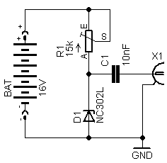 Rauschquelle mit Halbleiter-Rauschdiode